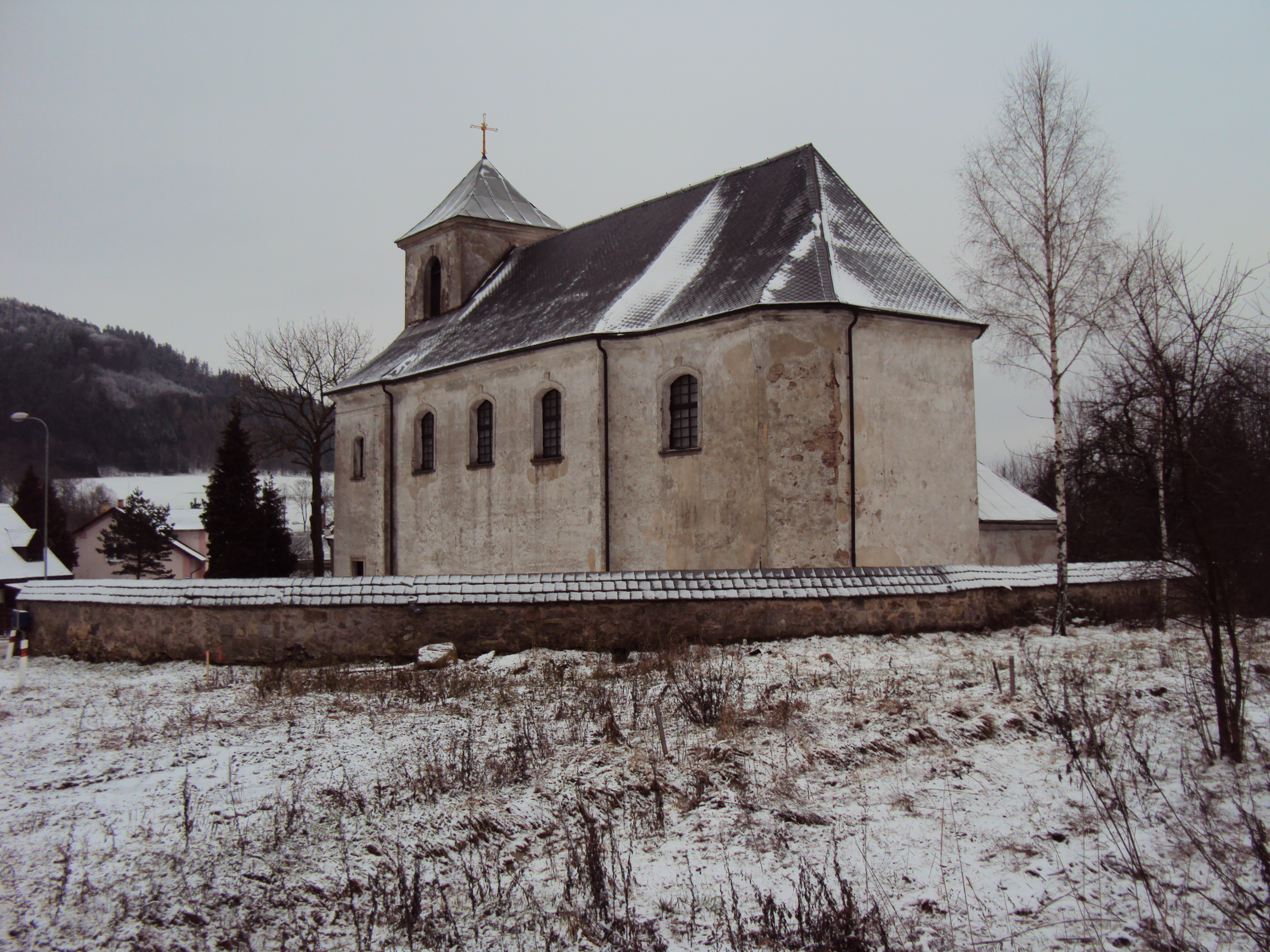 Mlýnický Dvůr Kostel